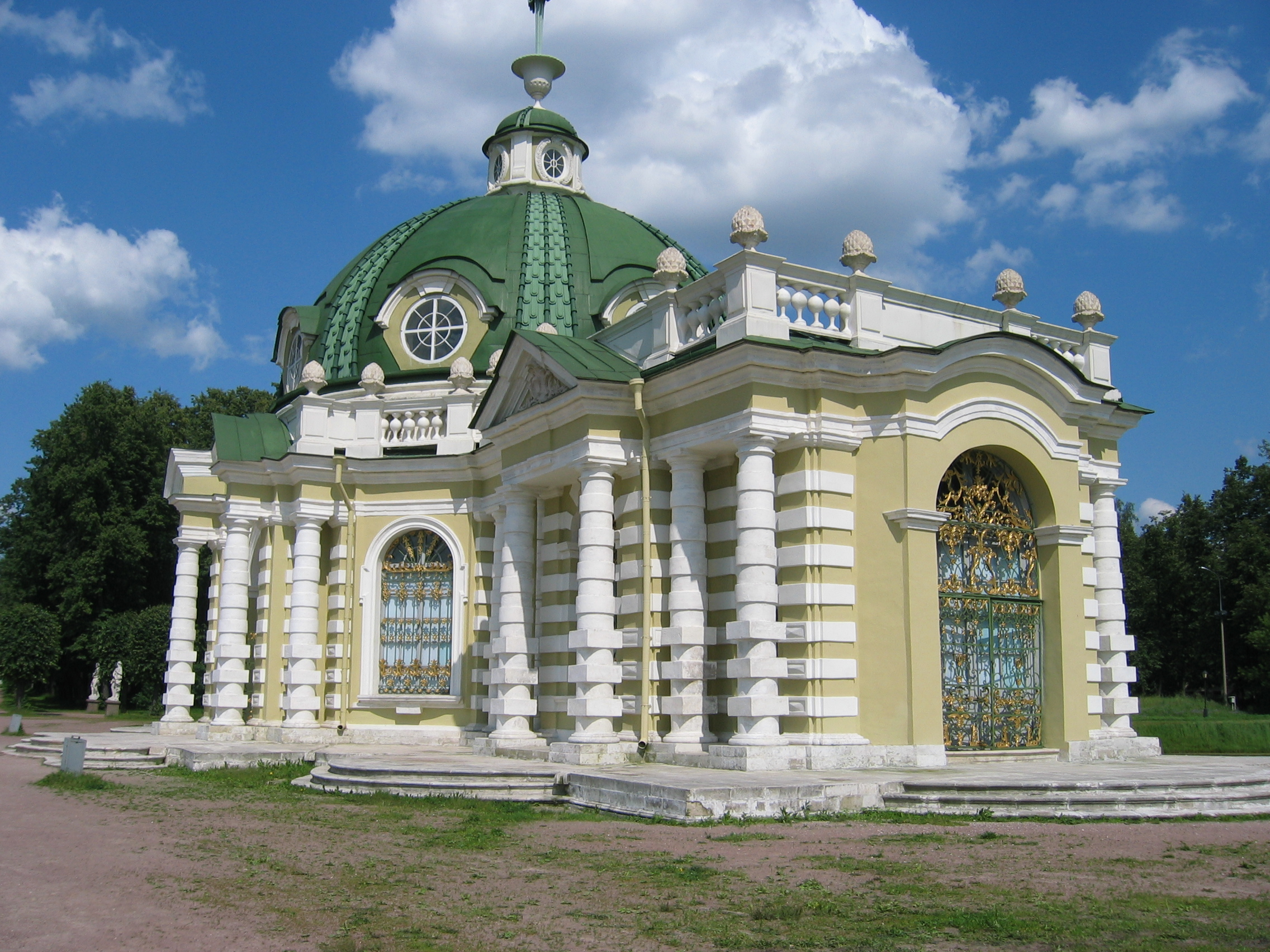 Кусково (Москва) Грот